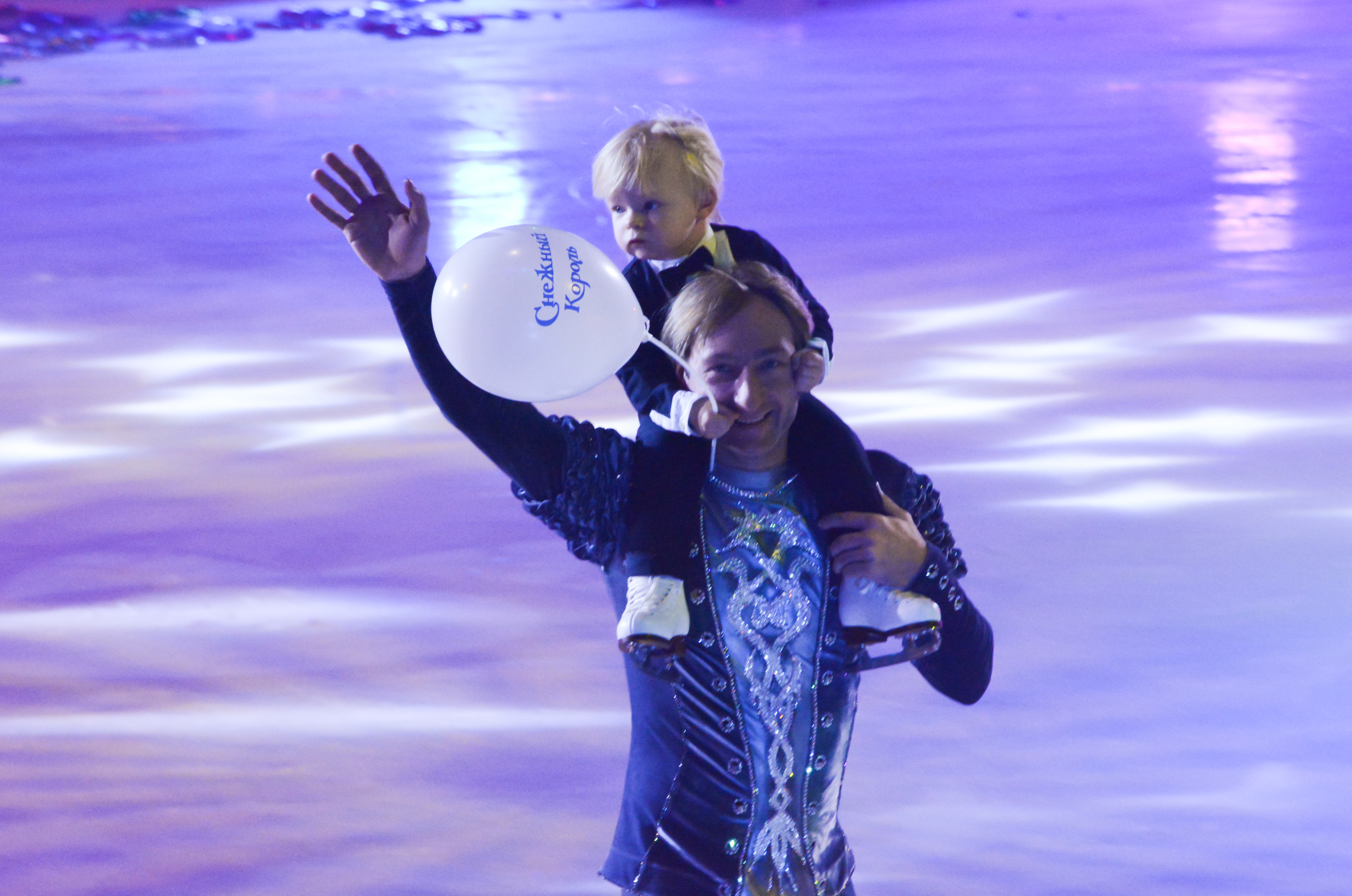 Евгений Плющенко с сыном Александром. Ледовое шоу-сказка «Снежный Король» (Санкт-Петербург)